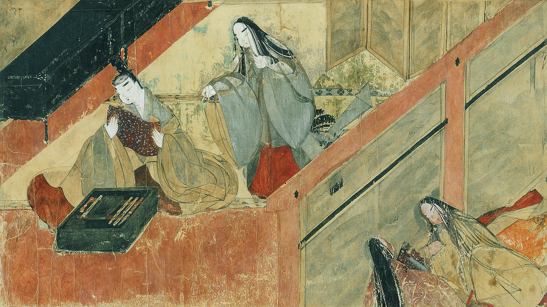 紙本著色／一面 平安時代後期・12世紀 縦21.8cm 横39.5cm 五島美術館蔵 『源氏物語』第３９帖「夕霧」。夕霧（光源氏の子）が、落葉宮（亡き柏木の妻）の母からの手紙を読んでいる。そこへ、その手紙を落葉宮から夕霧への恋文と誤解した雲居雁（夕霧の妻）が、嫉妬のあまり背後から忍び寄って奪い取ろうとする。